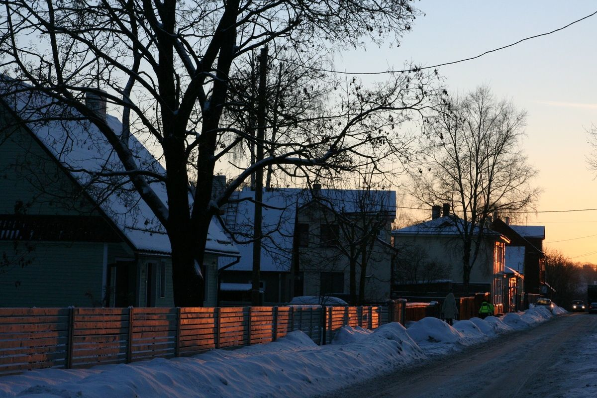 Roosi tänav